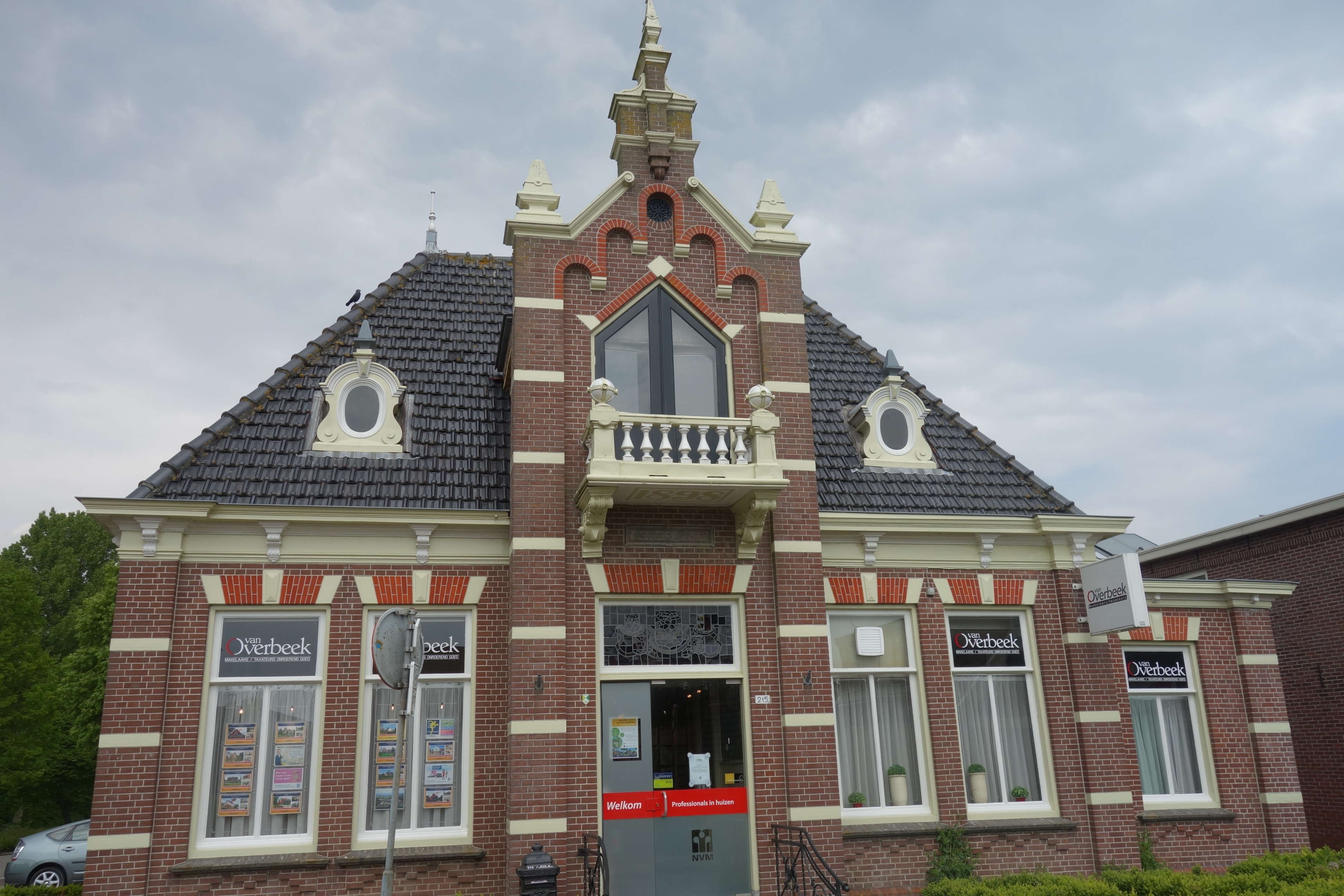 Voormalig woonhuis aan de Hoofdstraat 215 in Bovenkarspel. Pand is omgebouwd tot kantoor voor een makelaardij.